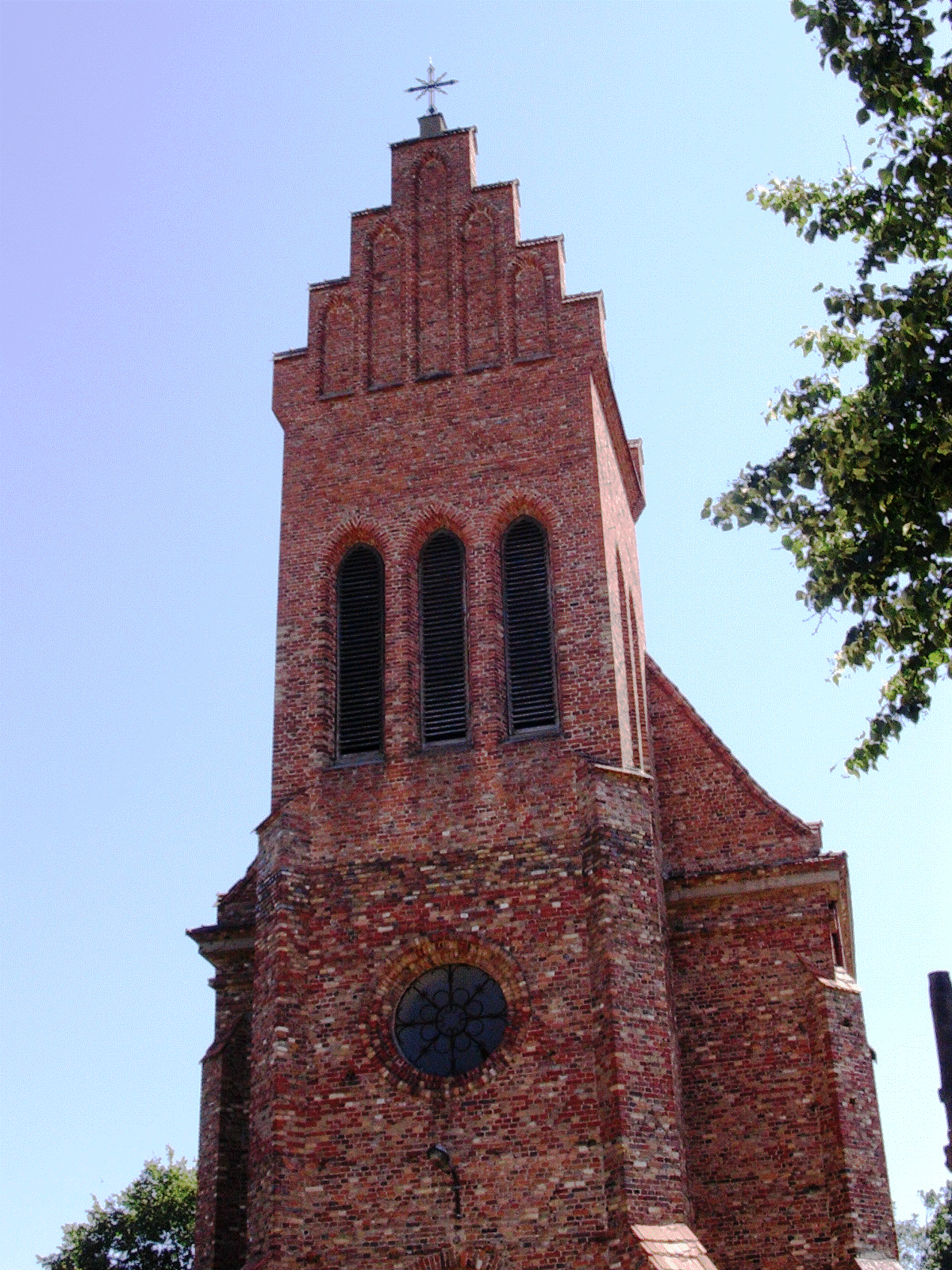 Dzwonnica kościoła w Czerwonce (gmina Sokołów Podlaski)